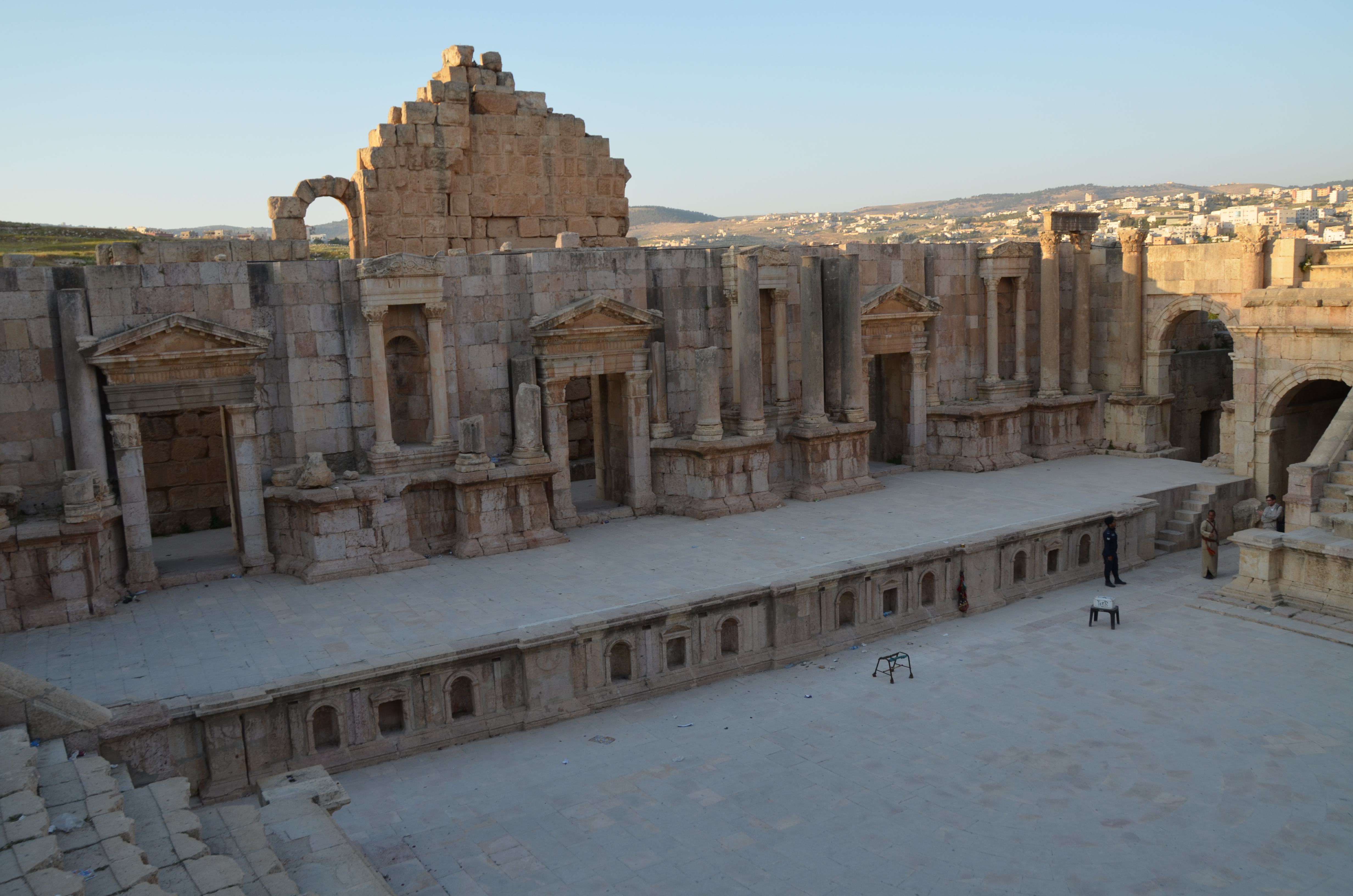 Gerasa, Jordan